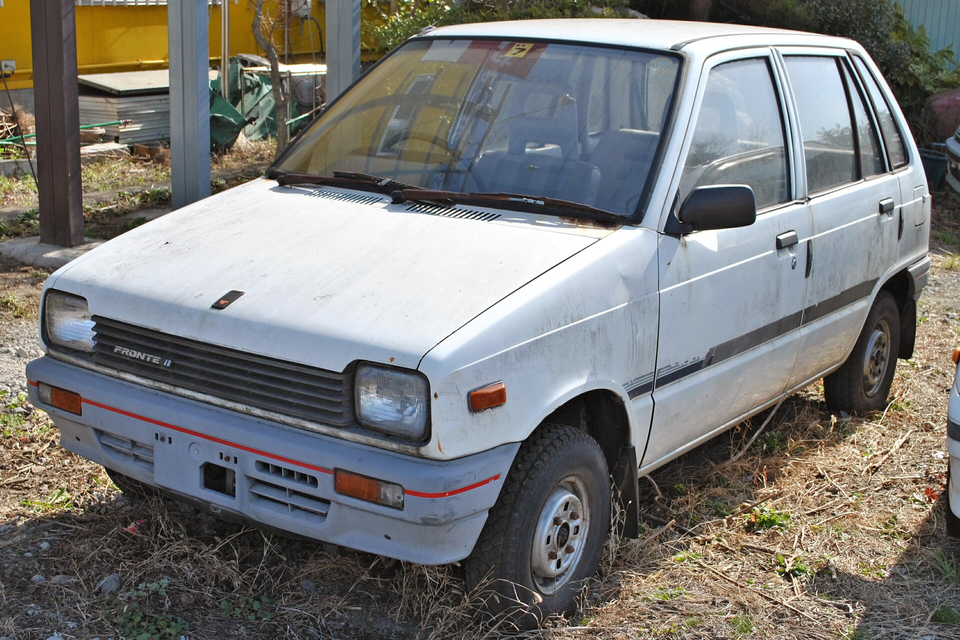 スズキ・フロンテ（6代目・前期形）